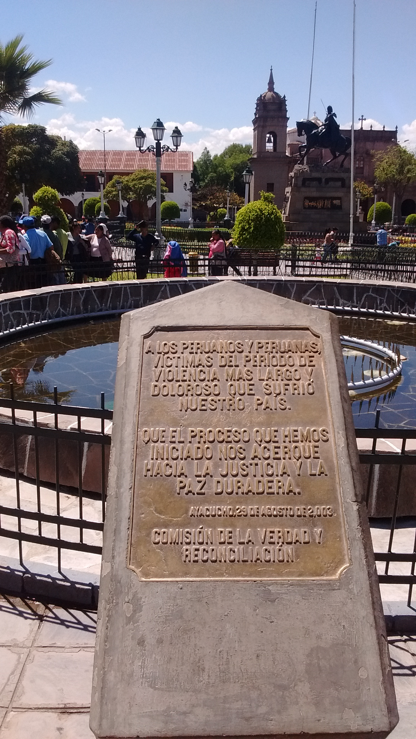 Placa conmemorativa de la Comisión de la Verdad y Reconciliación Nacional en la plaza de armas de Ayacucho